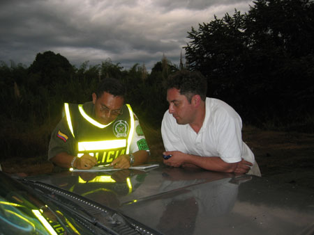 Una foto de un poicía impartiendo una inmfracción de tránsito en la vía Bogotá - Armenia.